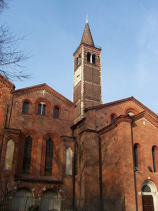 Campanile della Basilica di Sant'Eustorgio a Milano.